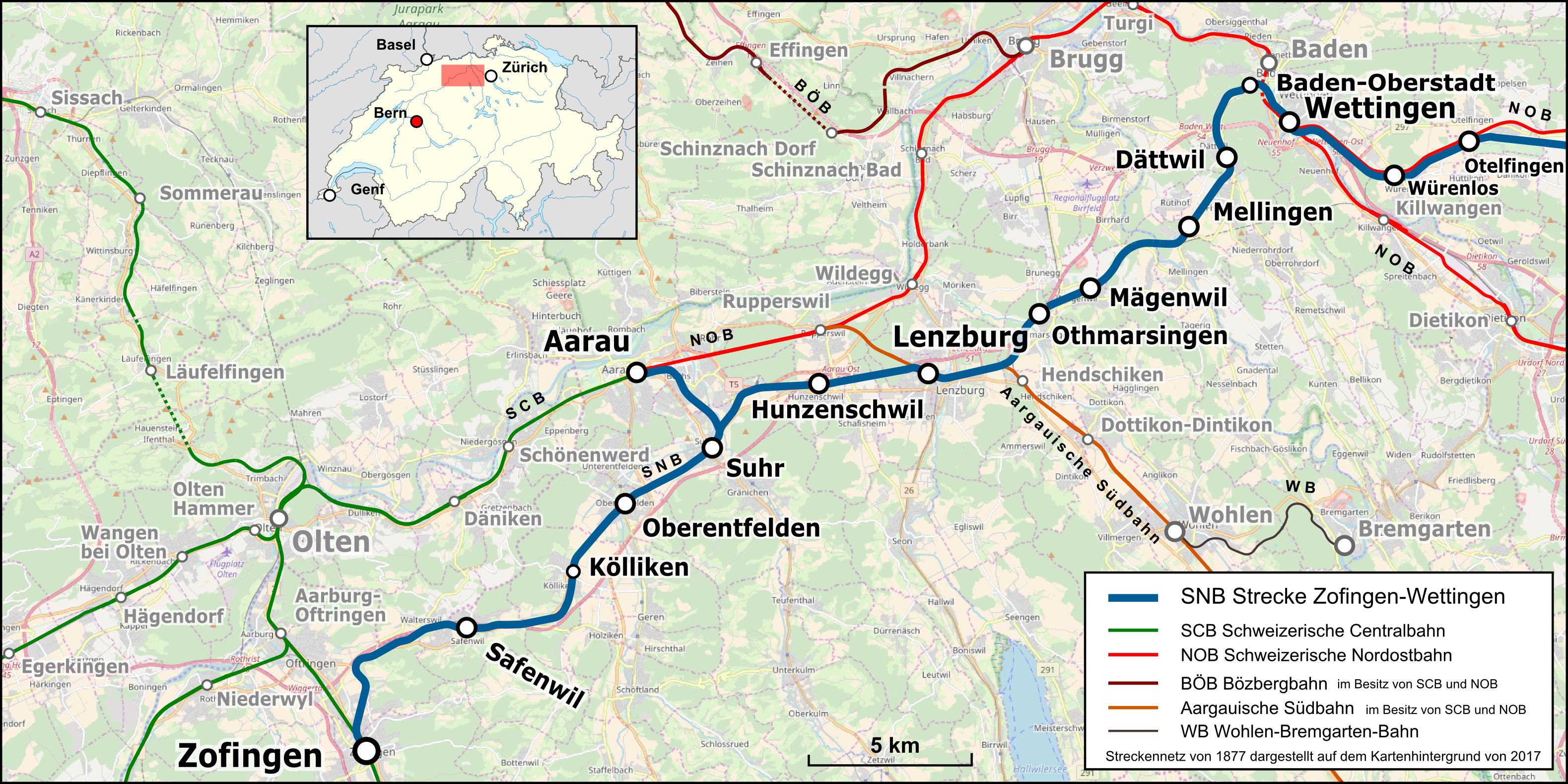 Karte der Strecke Zofingen—Wettingen der Schweizerischen Nationalbahn dargestellt im Eisenbahnnetz von 1877.